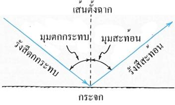 การสะท้อน